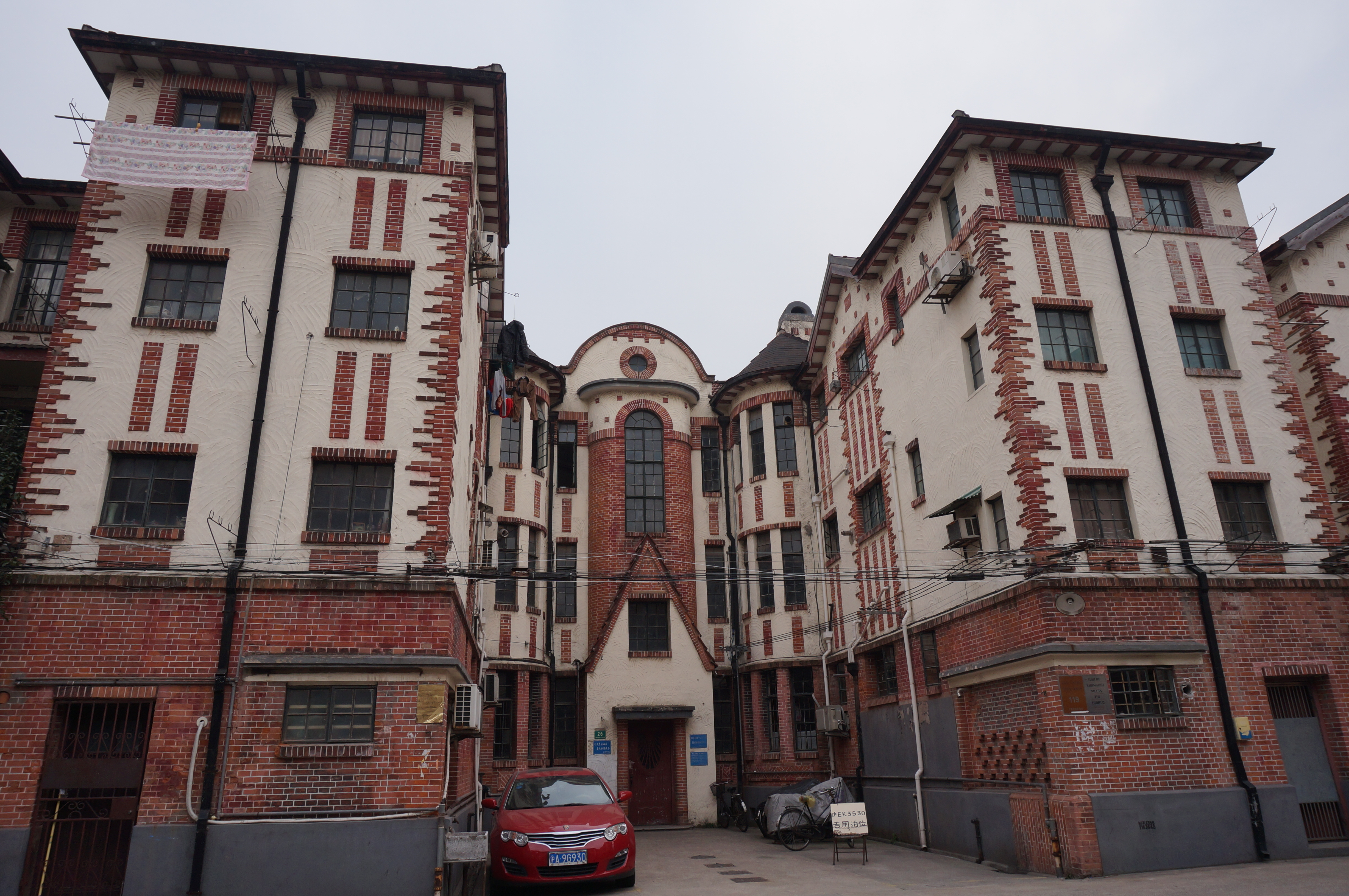 中文（中国大陆）: 克来门公寓